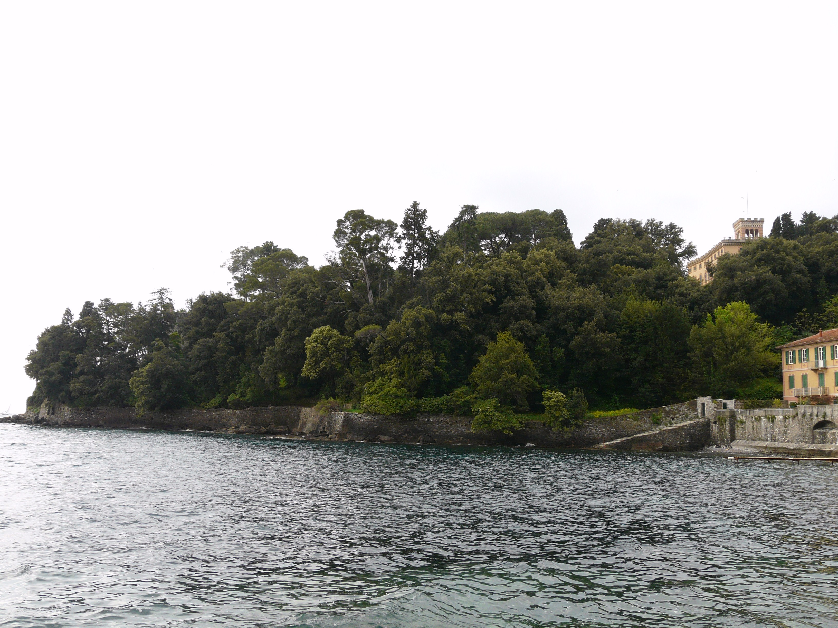 Parco della villa dell'Ordine di Malta, San Michele di Pagana, Rapallo, Liguria, Italia